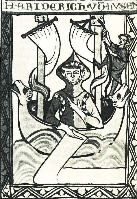 Darstellung des Friedrich von Hausen in der Weingartner Liederhandschrift.